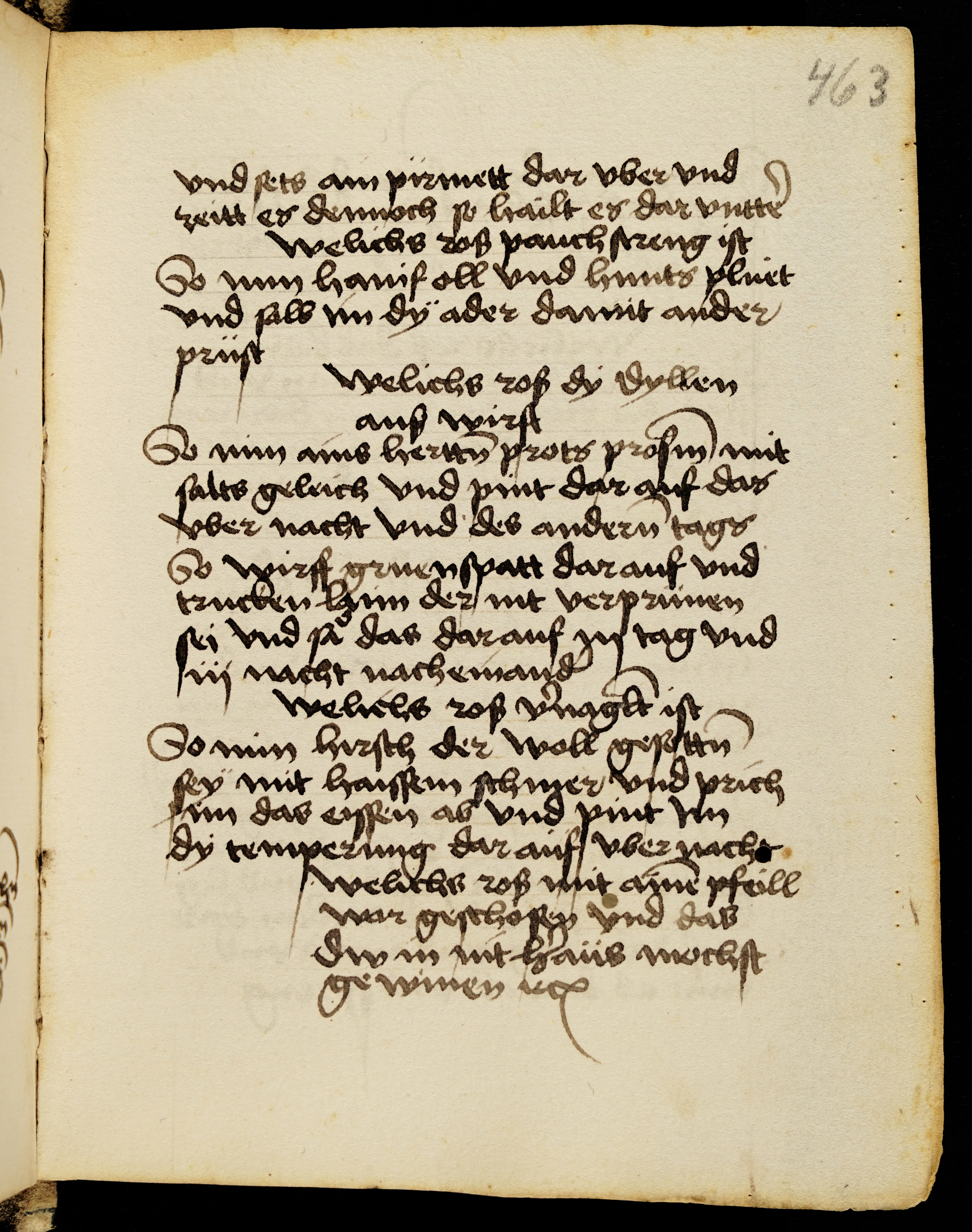 UBG Ms 1609 Sammelhandschrift; fol. 463r („Welches ross pauchstreng ist“) aus: (fol. 459r – 465v) [Pferdeheilkunde]. Beg. Wer ross ertznen will der soll das püechel lesen, das hat gemacht maister Albrant kaiser Fridrichs schmid und marstaler von Neaples, der hatt dise kunst alle versuecht . . .